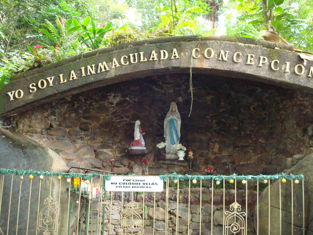 Gruta de Lourdes, Trujillo Alto, Puerto Rico